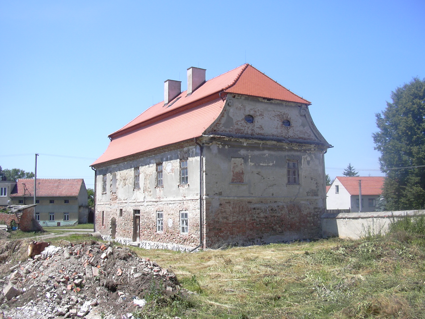 Farní budova Komořany (Vyškov District - Czech Republic)